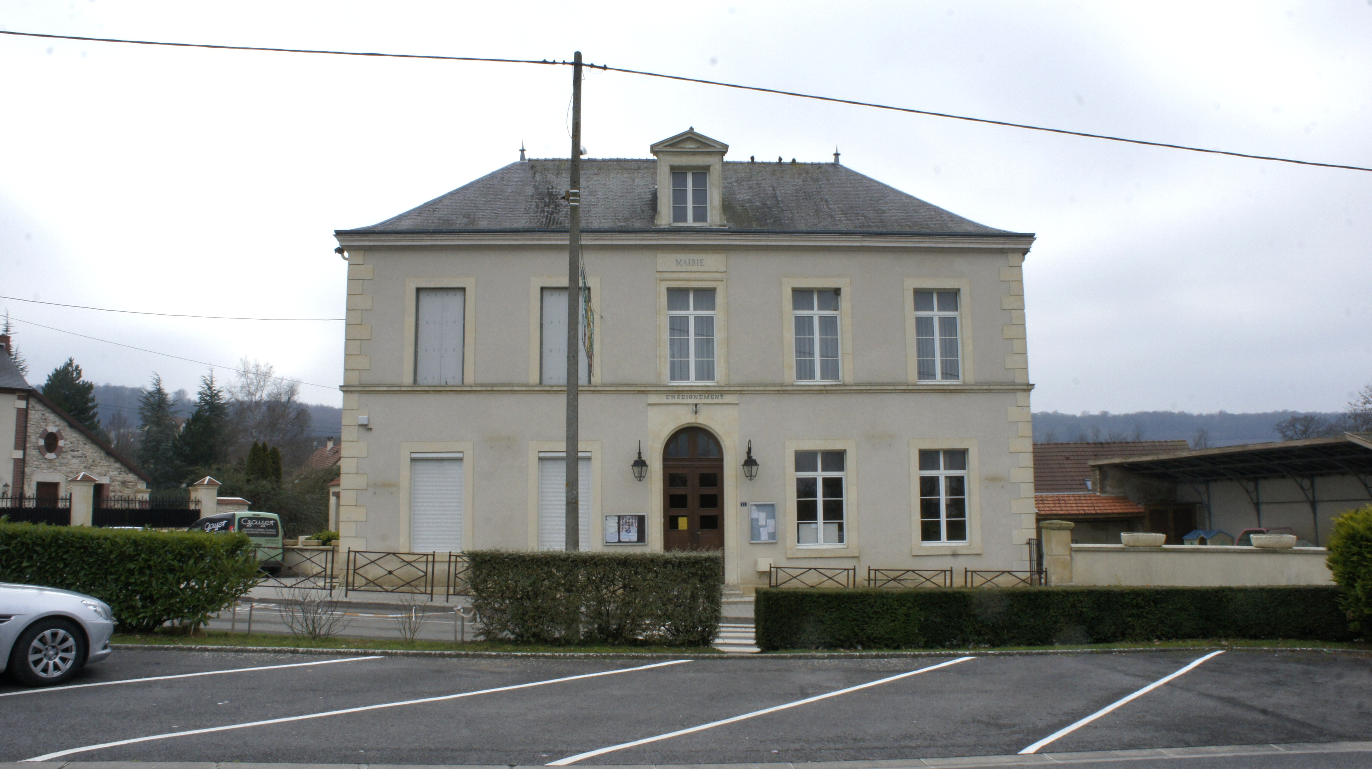 Une vue de la Mairie_de Sermiers .